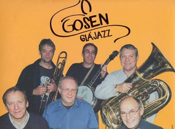 Gosen Gla'jazz